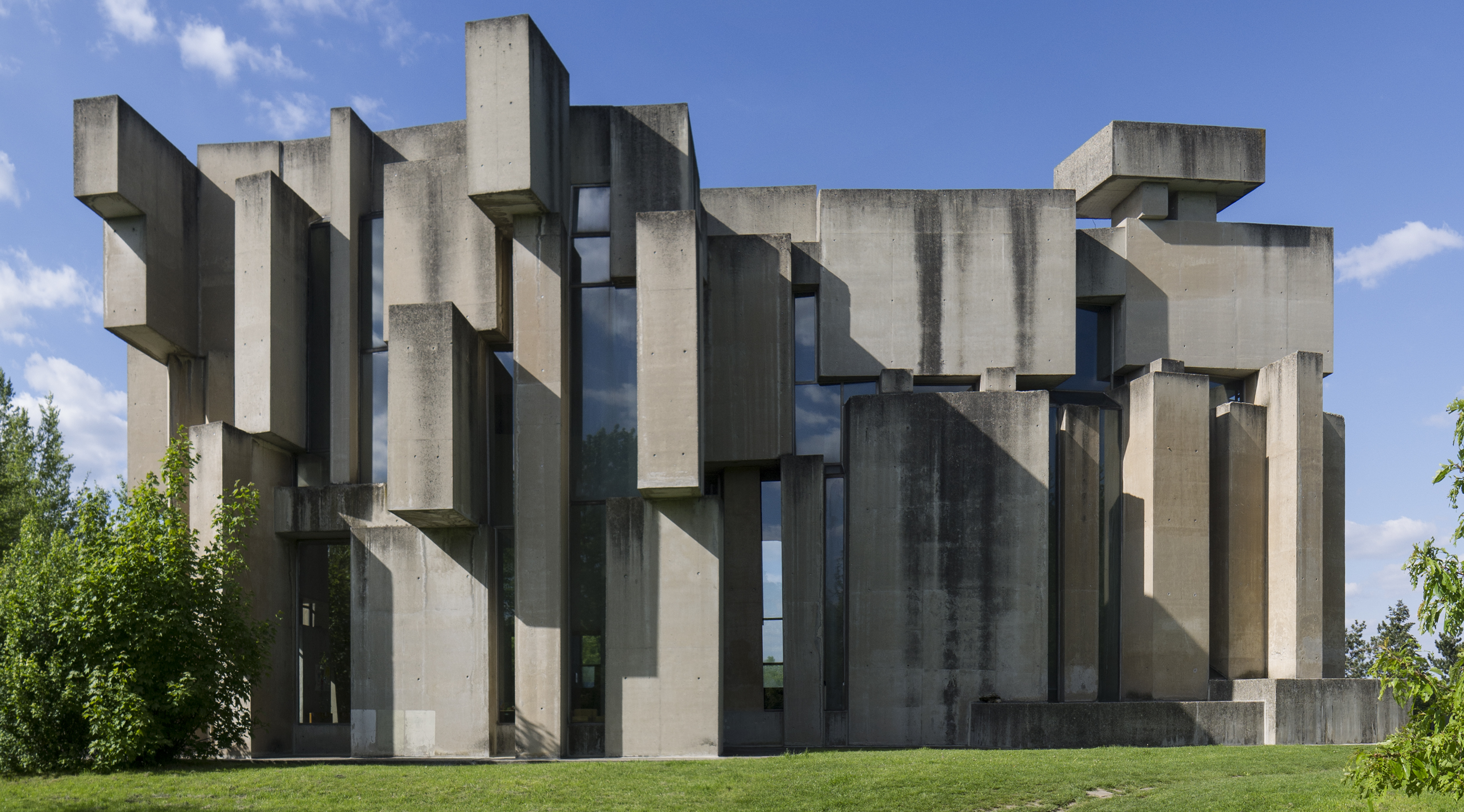 Kath. Filialkirche, Zur hl. Dreifaltigkeit, sogenannte "Wotruba-Kirche"